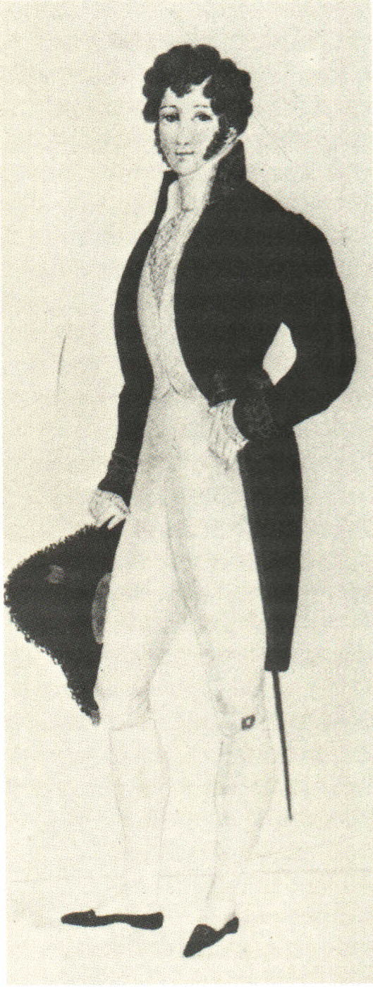 Kostuum ontwerp voor Ridderschap Vriesland (1825)